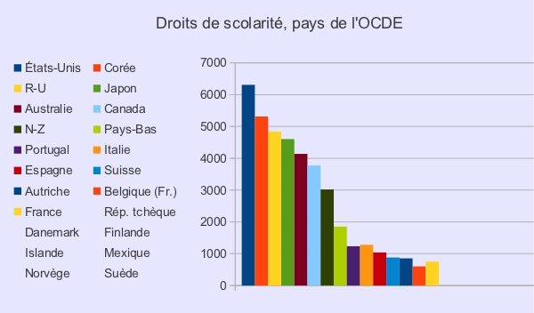 Source : Regards sur l'éducation 2011 : Les indicateurs de l'OCDE. ( (voir Indicateur B5)